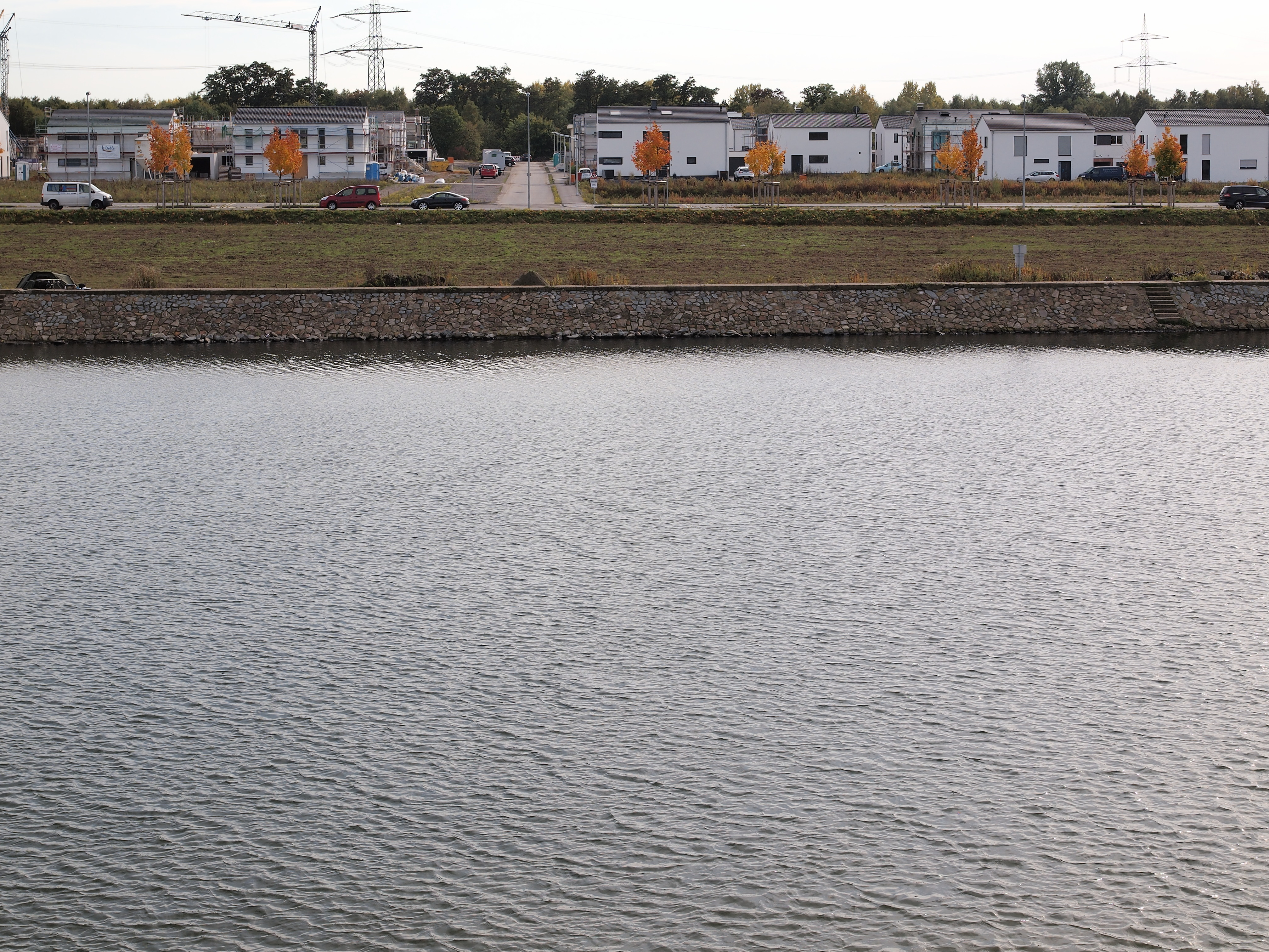 Hafen der ehemaligen Zeche Graf Bismarck in Gelsenkirchen mit neuer Wohnbebauung auf dem abgeräumten Zechengelände